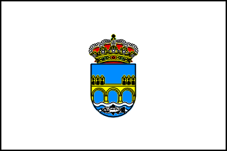 Bandera de Puente Nuevo/A Pontenova, en Lugo (España)